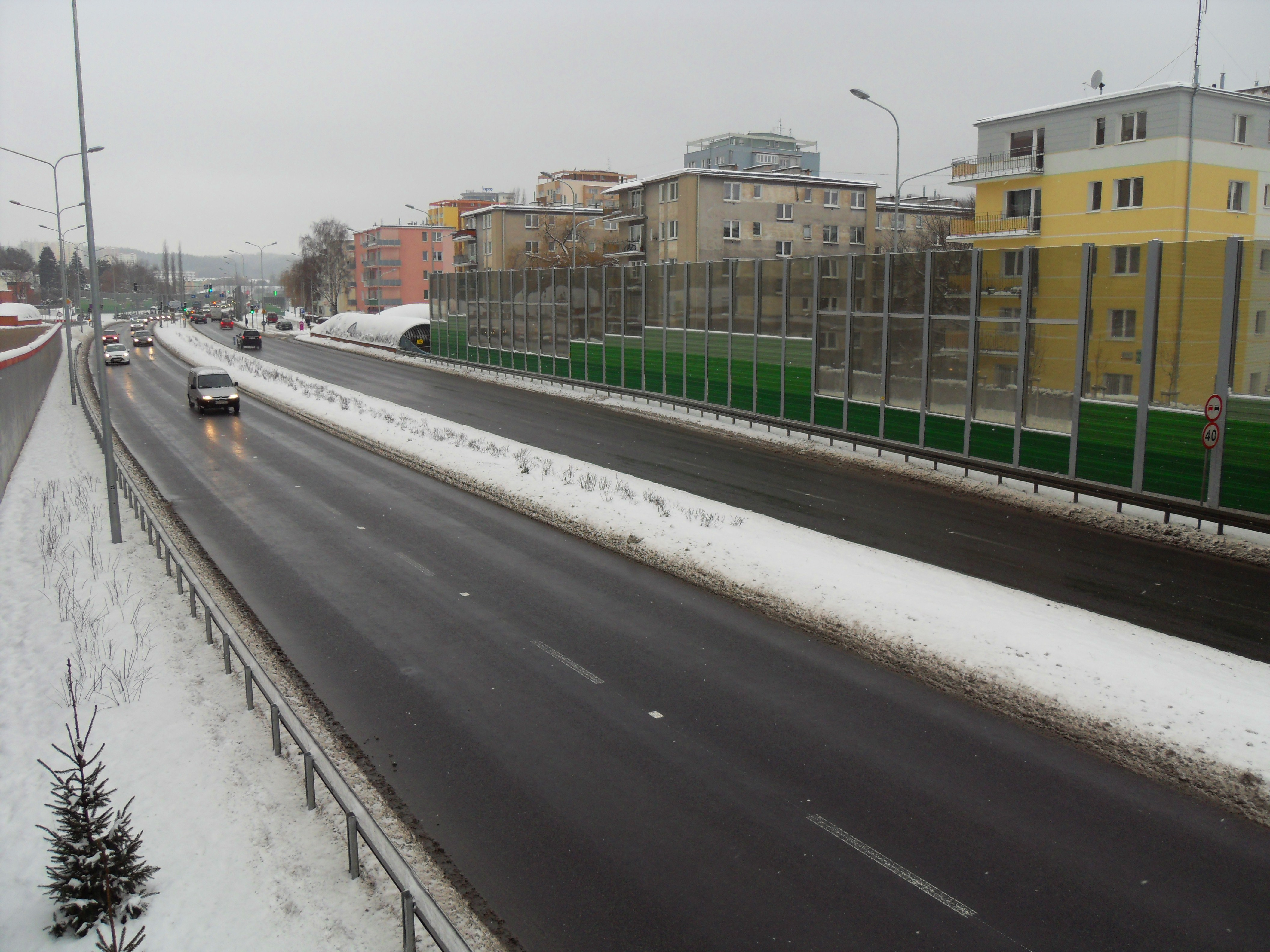 Gdańsk Wrzeszcz. Trasa Słowackiego (przed przebudową ul. Partyzantów).